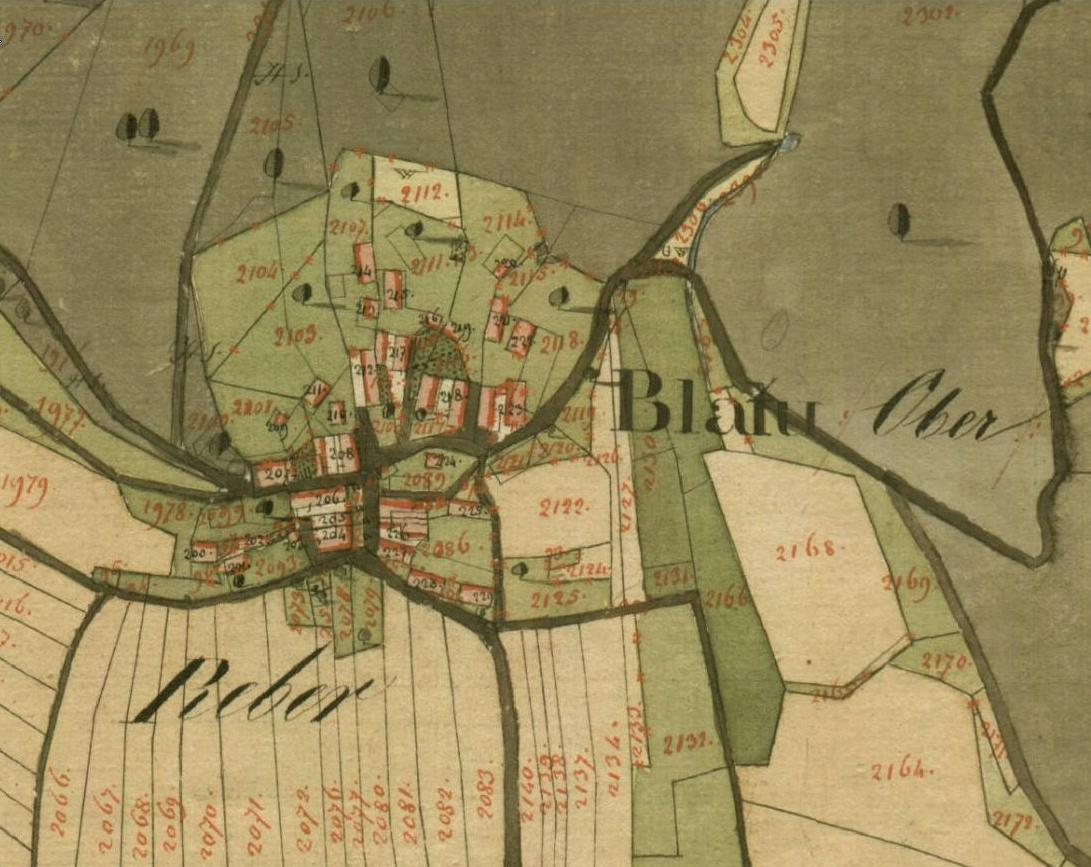 Gorenje Blato na Franciscejskem katastru